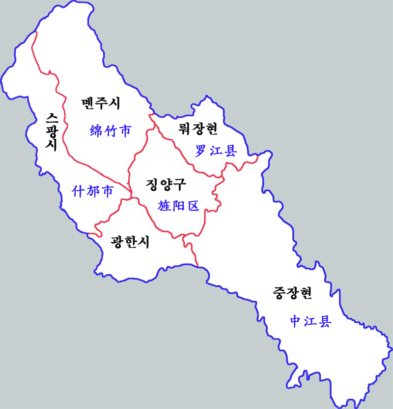 더양시 현급구역도